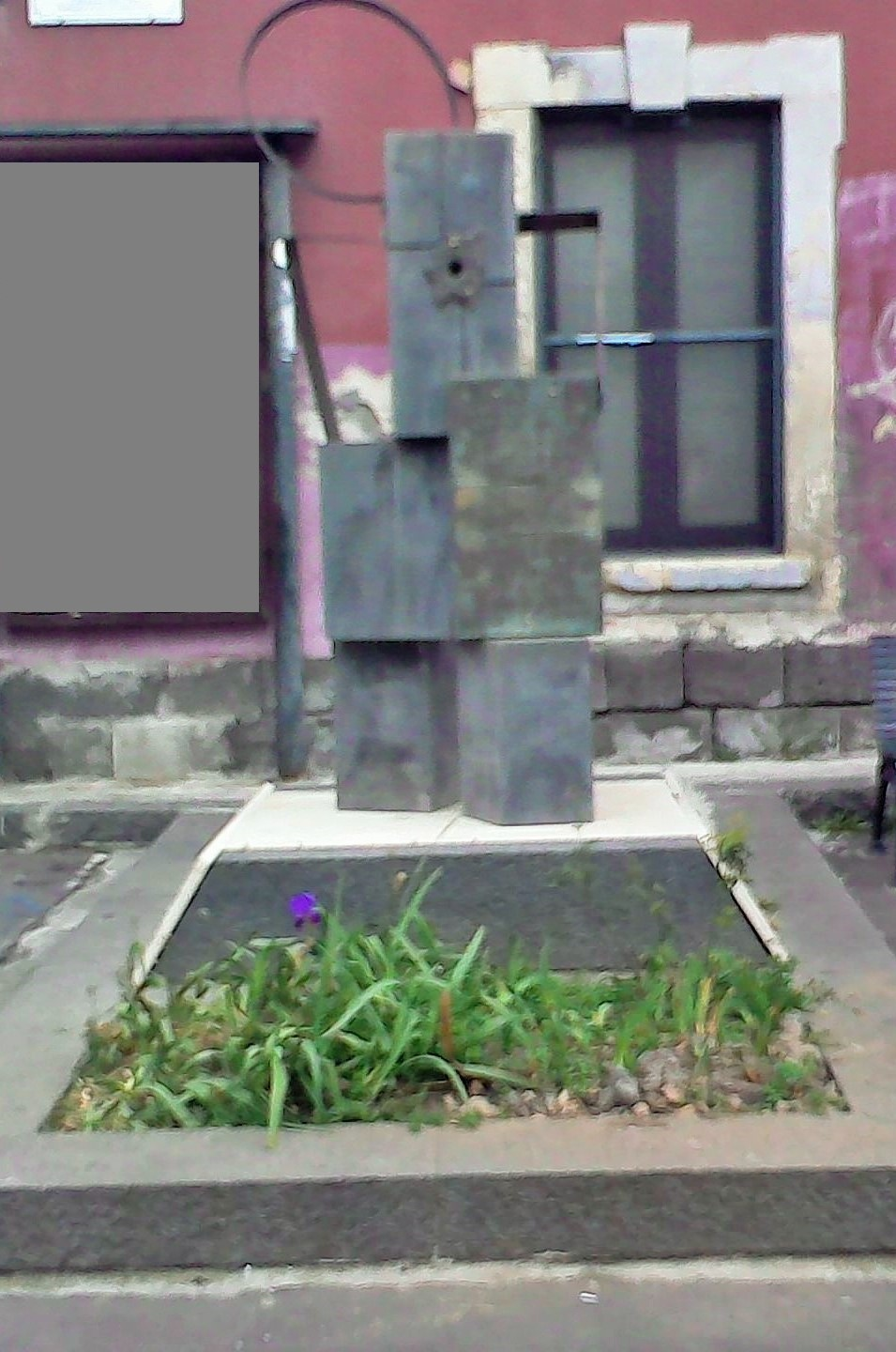 Monumento edificato alla memoria di Orazio Costorella - Misterbianco